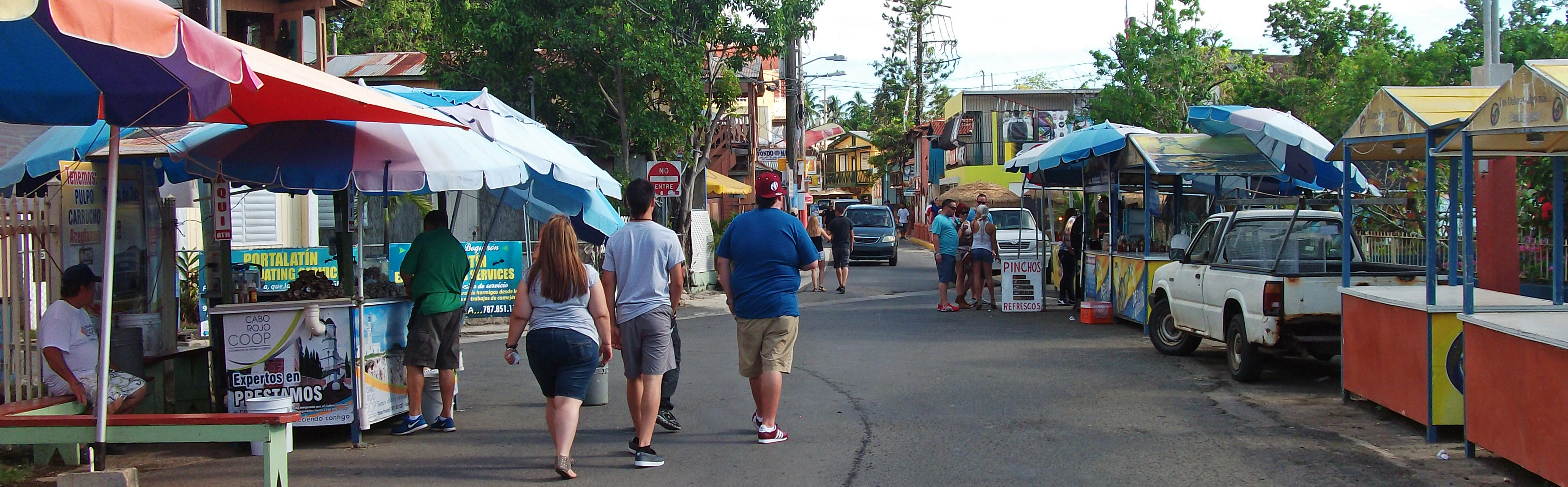 Turistas en Boquerón